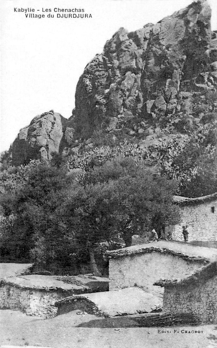 Les Chenachas, village du Djurdjura en Kabylie (Algérie) : maisons paysannes kabyles à toiture de terre légèrement bombées (carte postale en noir et blanc des années 1900).